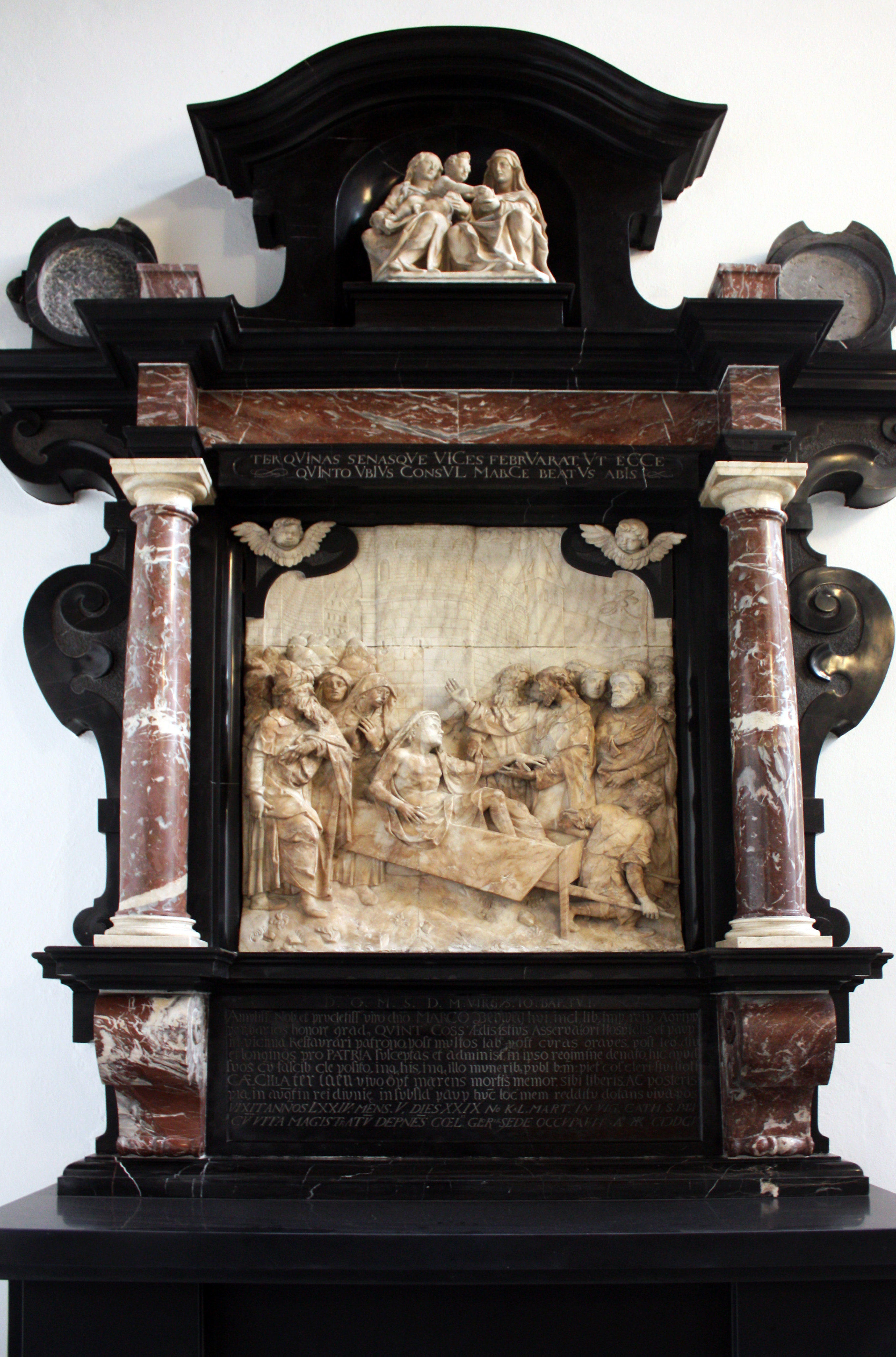 St. Johann-Baptist, Köln. Der “Annen-Altar” (1605), war eine private Stiftung der Cäcilia Therlan zum Andenken an ihren 1605 verstorbenen Gatten, den Kölner Bürgermeister Marcus Beyweg.